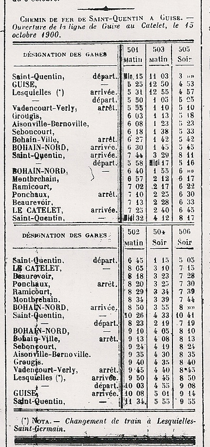 Horaire en 1900.